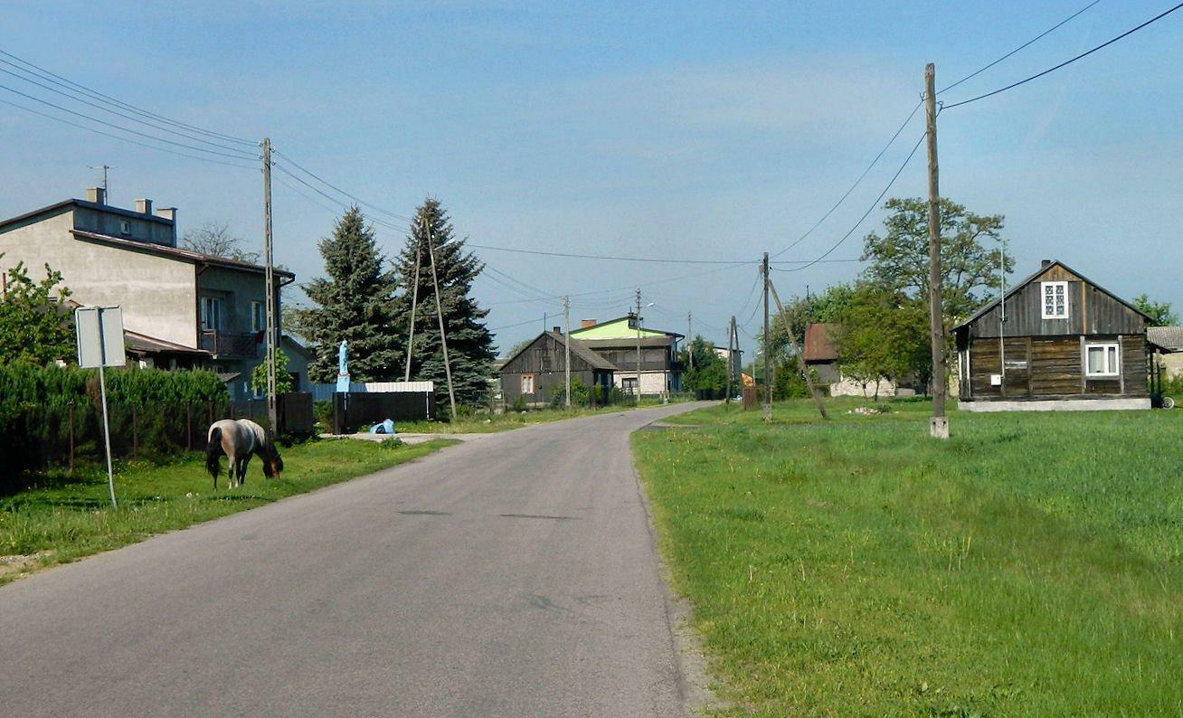 Ludwików